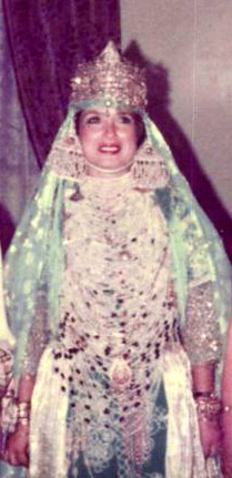 Costume traditionnel tlemcénien